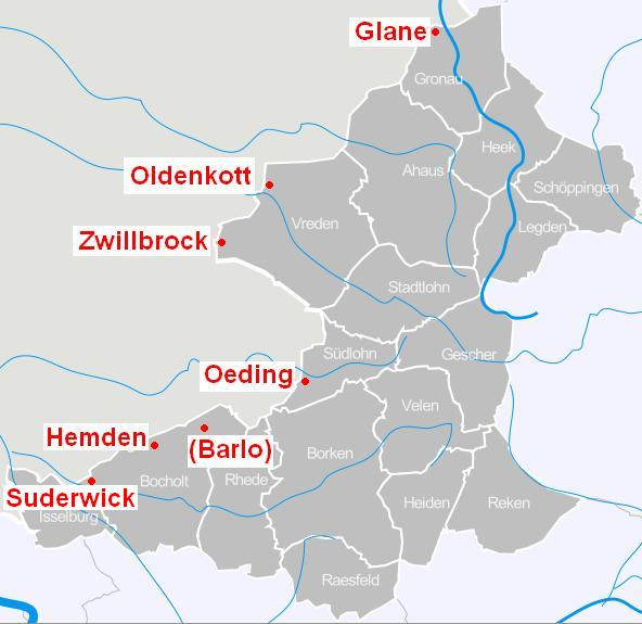 Municipalities (Gemeinden) in Kreis Borken, Nordrhein-Westfalen